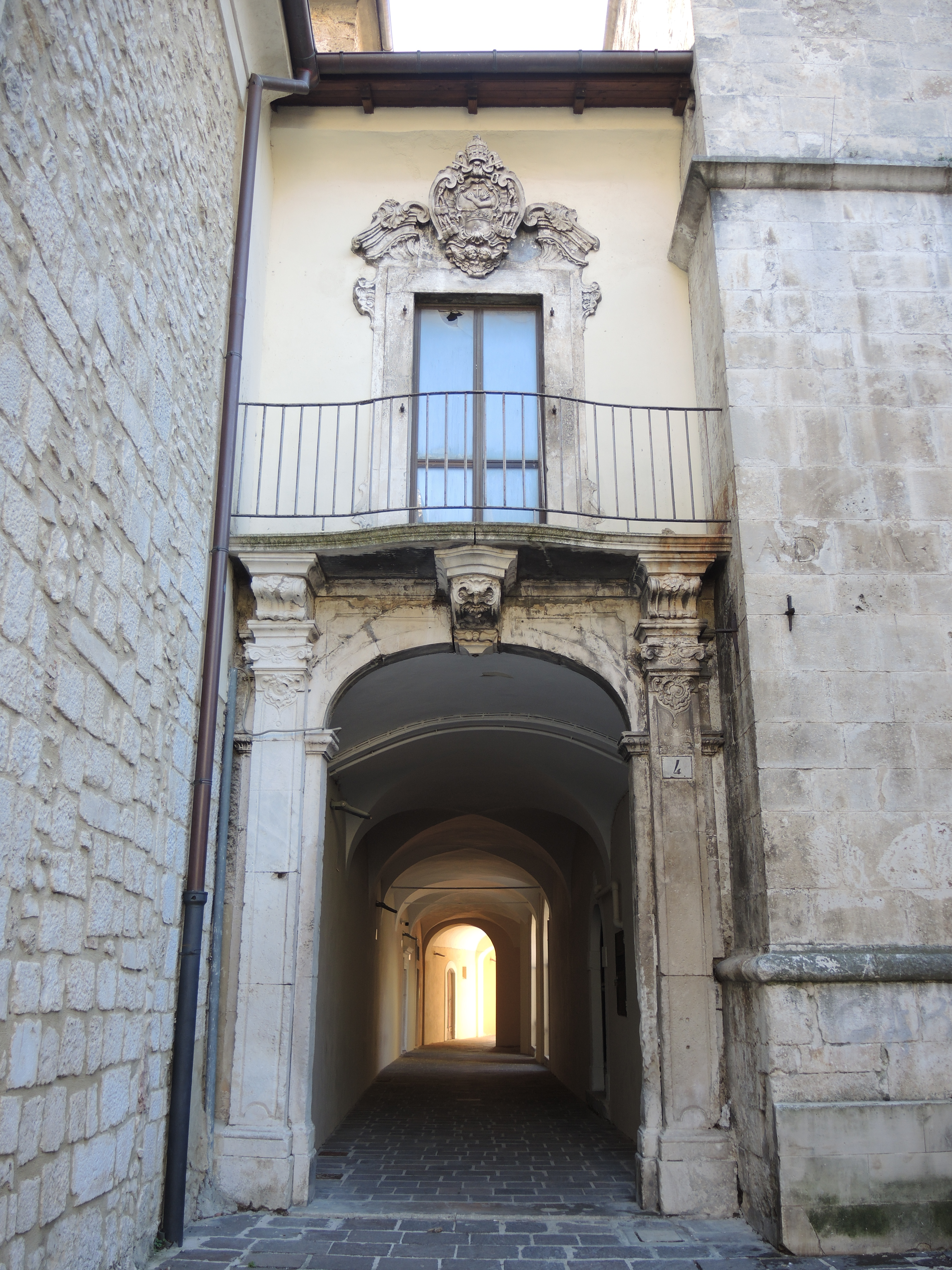 Popoli (PE): Chiesa di San Francesco